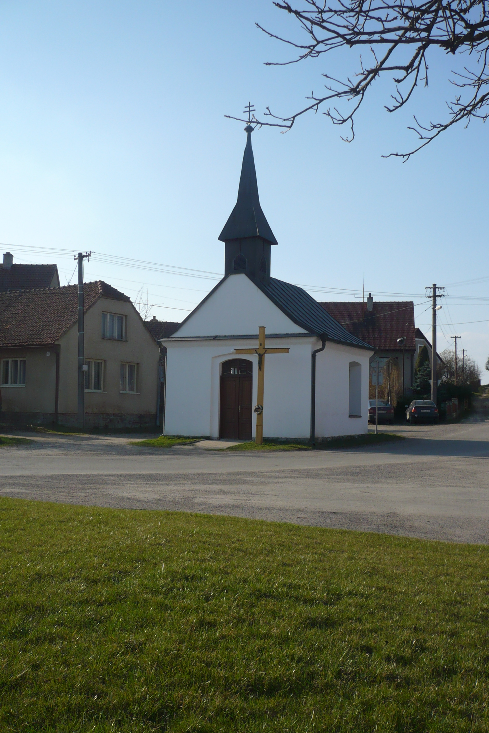 Kaple sv. Václava